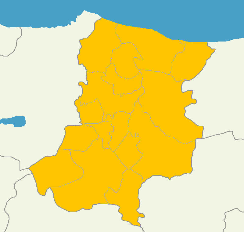 Sakarya'da 2014 Türkiye cumhurbaşkanlığı seçimi